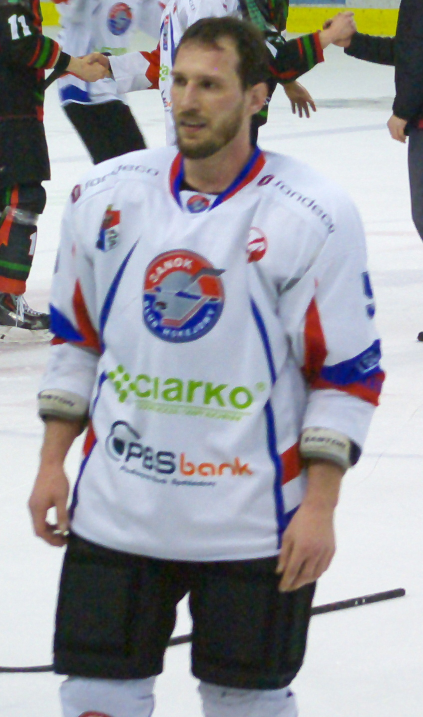 Szósty mecz finałowy o mistrzostwo Polski w hokeju na lodzie w sezonie PHL 2013/2014: Ciarko PBS Bank KH Sanok – GKS Tychy (2:0), 3 kwietnia 2014 w Sanoku (Arena Sanok). Martin Richter